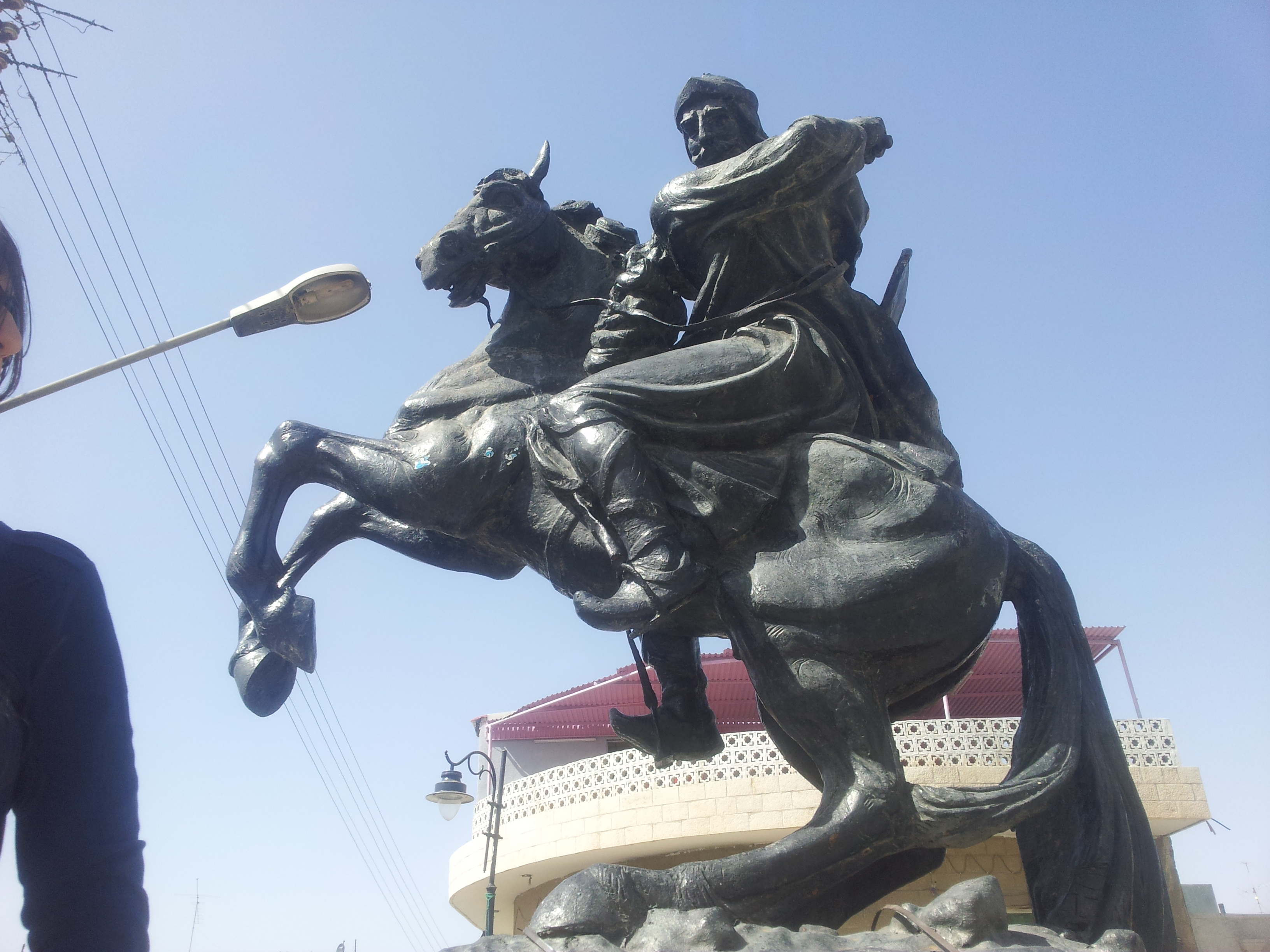 IT:Statua di Saladino